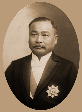 詹天佑1918年留影